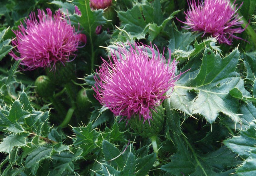 Cirsium acaule